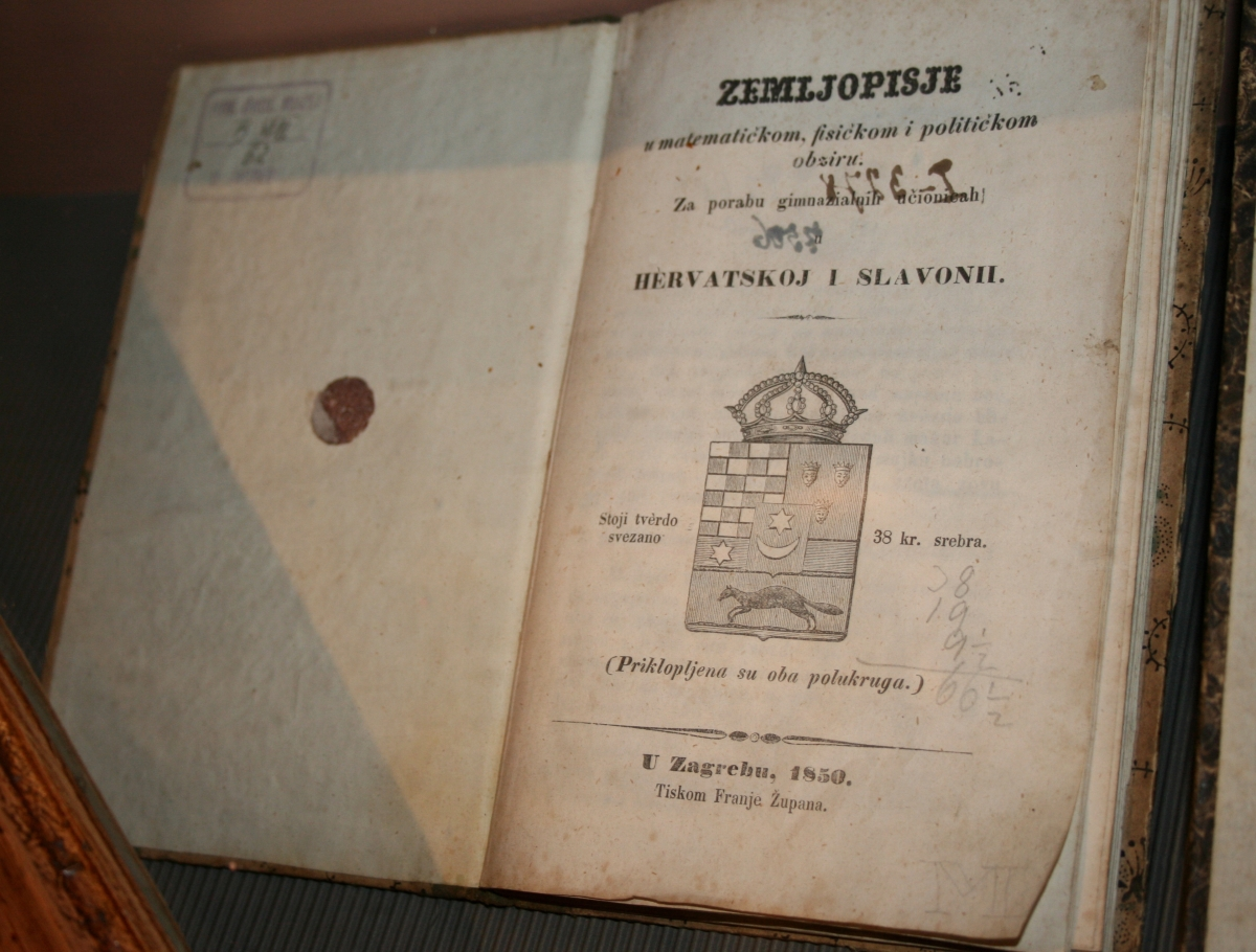 snimljeno tijekom Noći muzeja